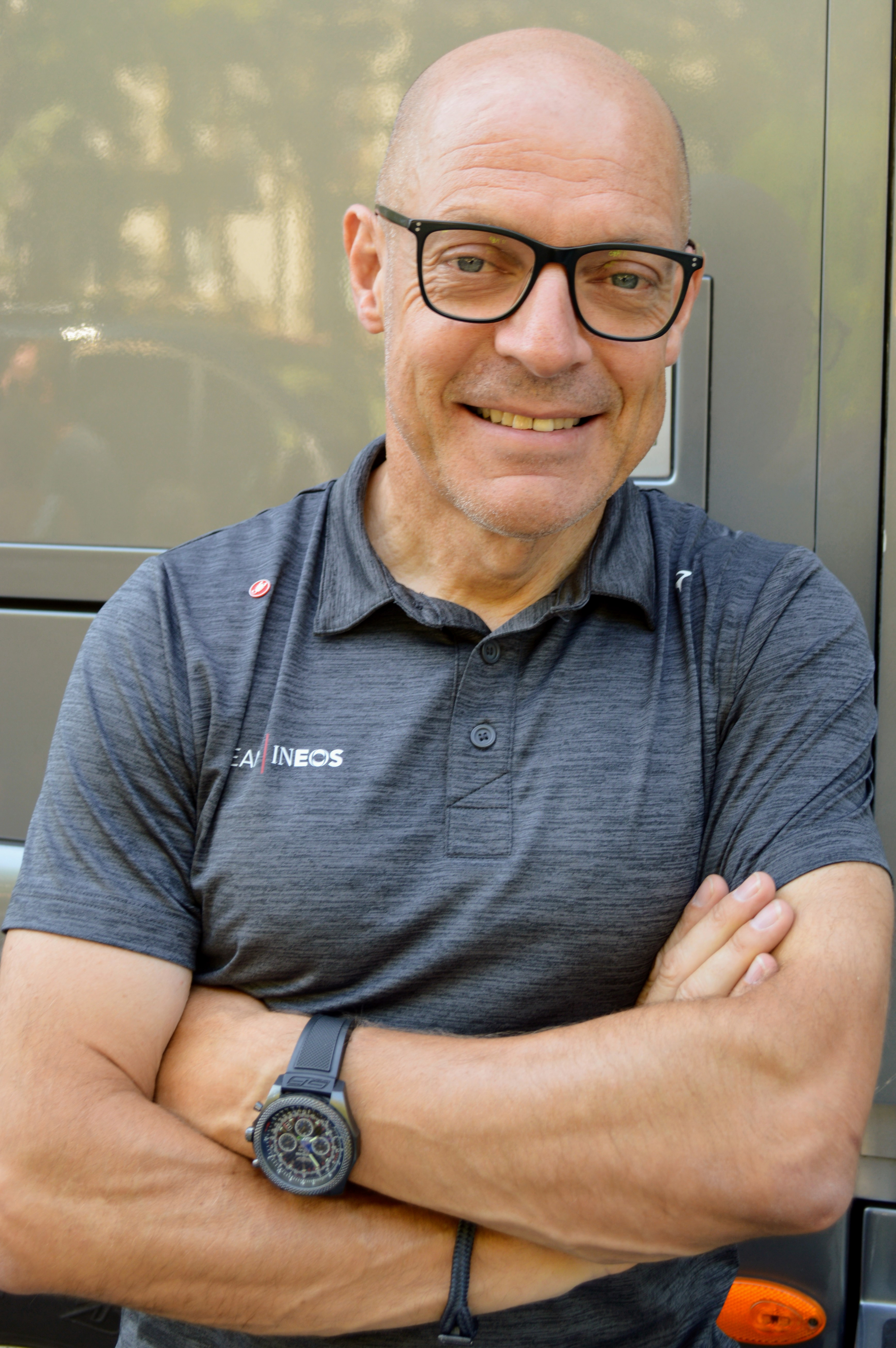 Dave BRAILSFORD - Août 2019 (Clasica San Sebastian)